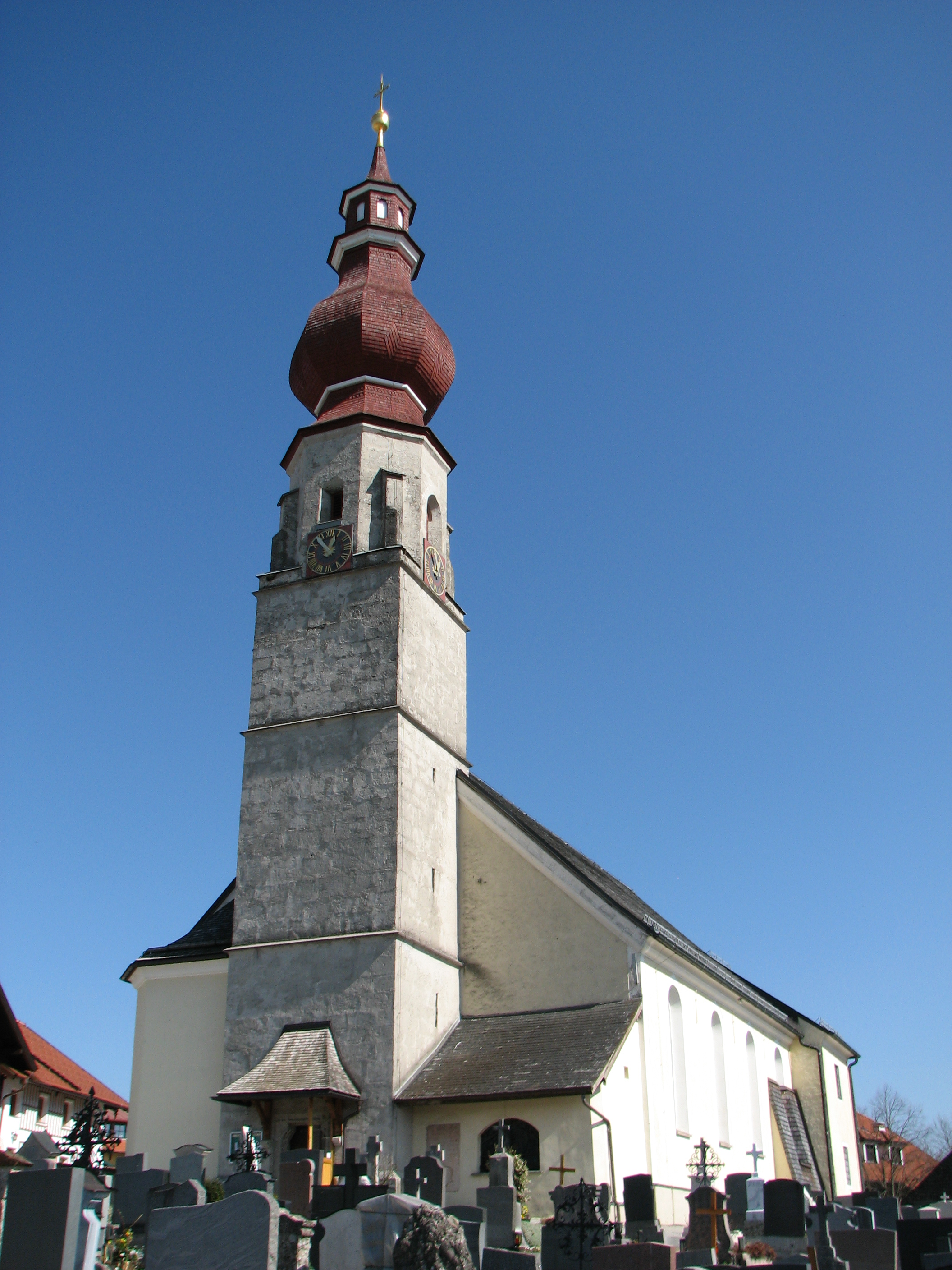 Kath. Pfarrkirche hl. Martin, Fundstelle (Römische Kaiserzeit)